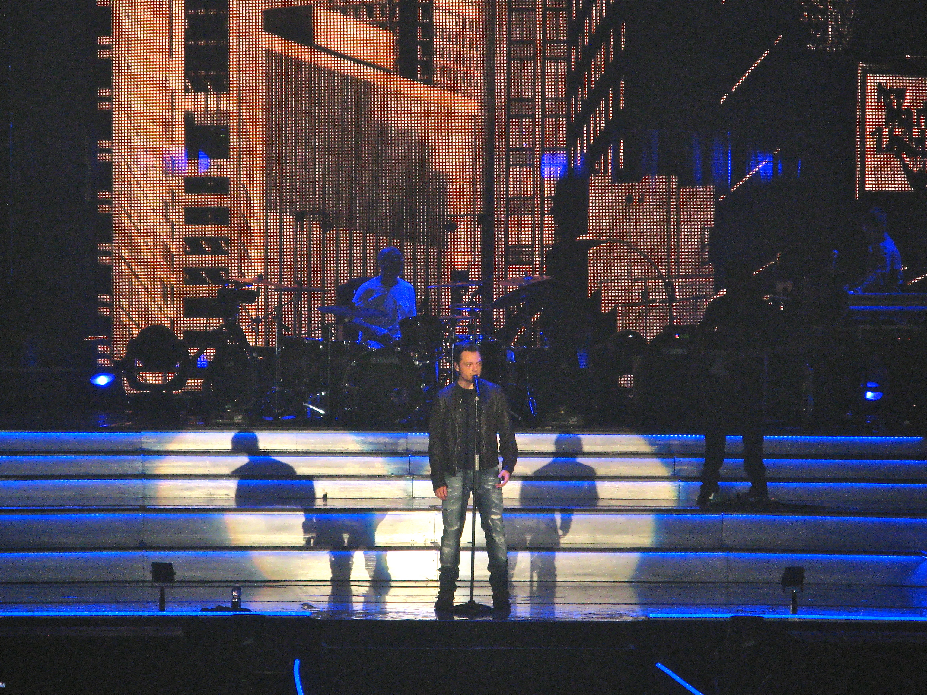 Tiziano Ferro interpreta Hai delle isole negli occhi il 7 maggio 2012 al PalaVerde di Villorba.